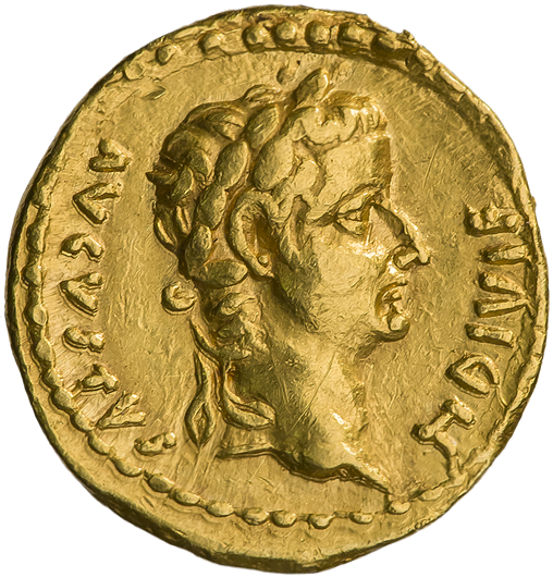 Золотой квинарий. Тиберий. Ок. 23—24 гг. (аверс). Надпись TI DIVI F — AVGVSTVS. Голова Тиберия в лавровом венке, вправо.